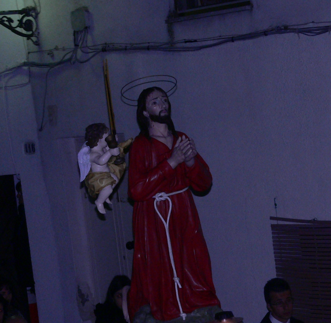 Statua di Cristo nell'orto portata in processione a Ceglie Messapica in occasione della processione dei Misteri.